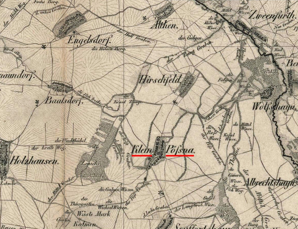 Kleinpösna auf einem Ausschnitt aus: Blatt 2 des Topographischen Atlas des Königreichs Sachsen : auf Befehl weiland Sr. Majestät des Königs Friedrich August aus der großen topographischen Landes-Aufnahme reducirt und bearb. bei der Königlichen Militair-Plankammer / bearb. von Oberreit. Gestochen von Bach. - 1:57 600. - Dresden 1836 -1860. - 1 Kt. in 22 Bl.